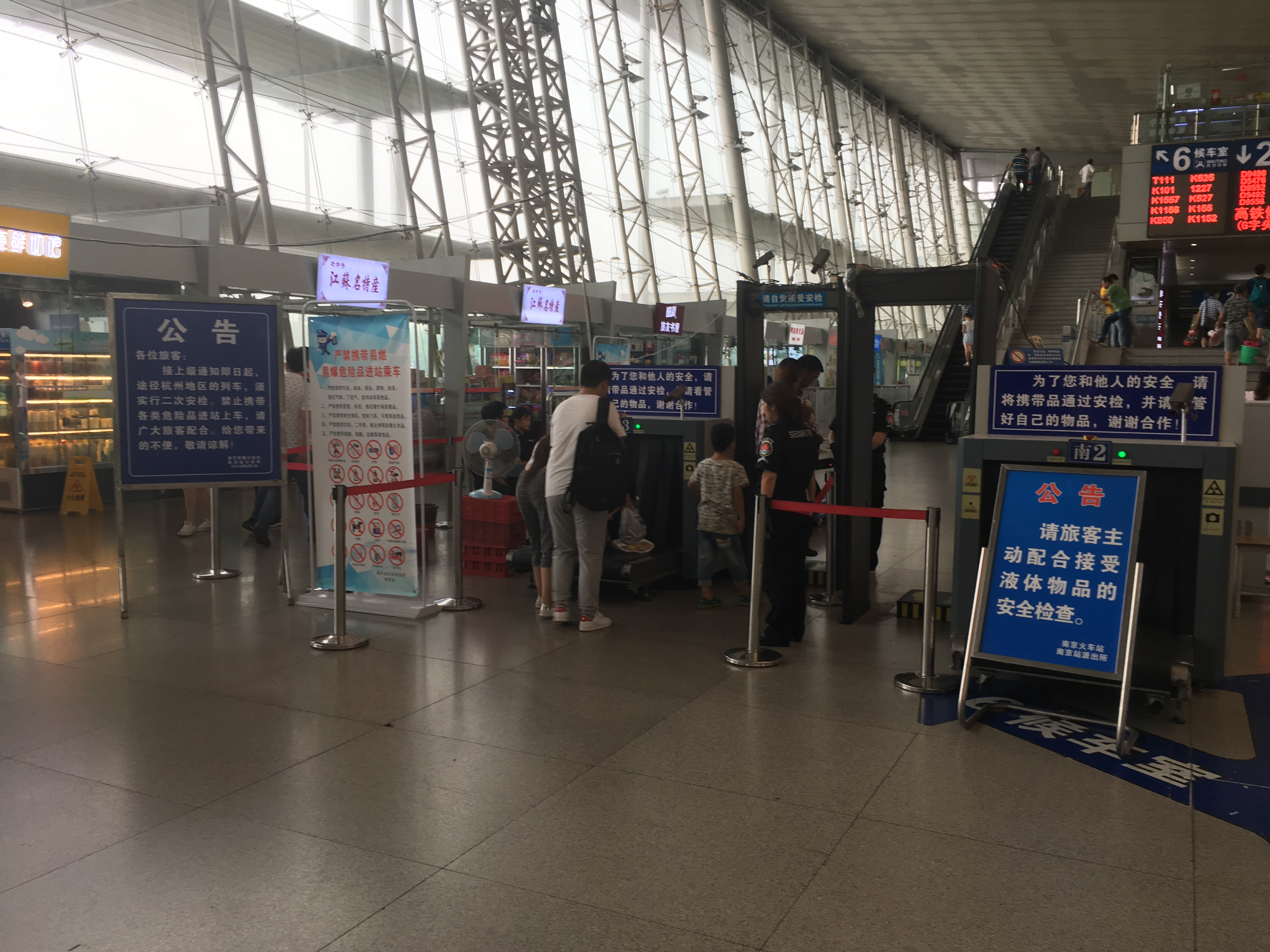 中文（中国大陆）: 2016年8月，南京站对途经杭州地区的旅客实行二次安检。（图中文字均为公有领域）